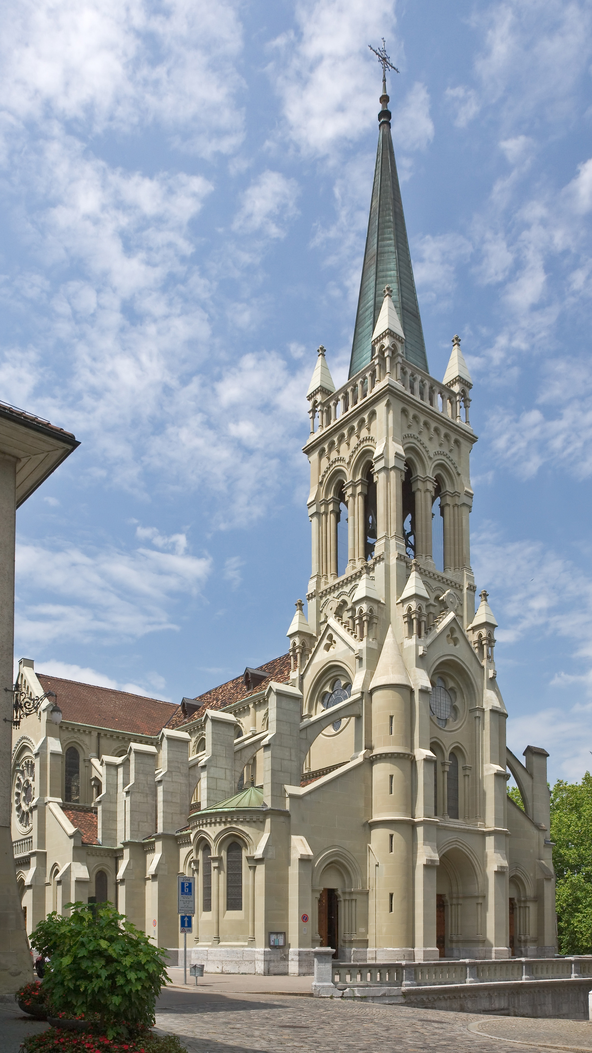 Kirche St. Peter und Paul in Bern, erbaut 1857–1864. Architekt war Pierre Joseph Edouard Deperthes[1] Quellen: ↑ Andreas Hauser: Ferdinand Stadler. Krauthammer : Zürich 1976 S. 161f